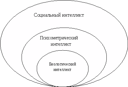 Структура интеллекта